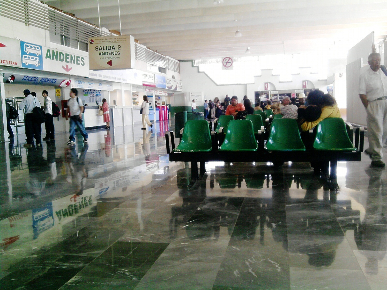 Interior de la central de Autobuses de Pachuca